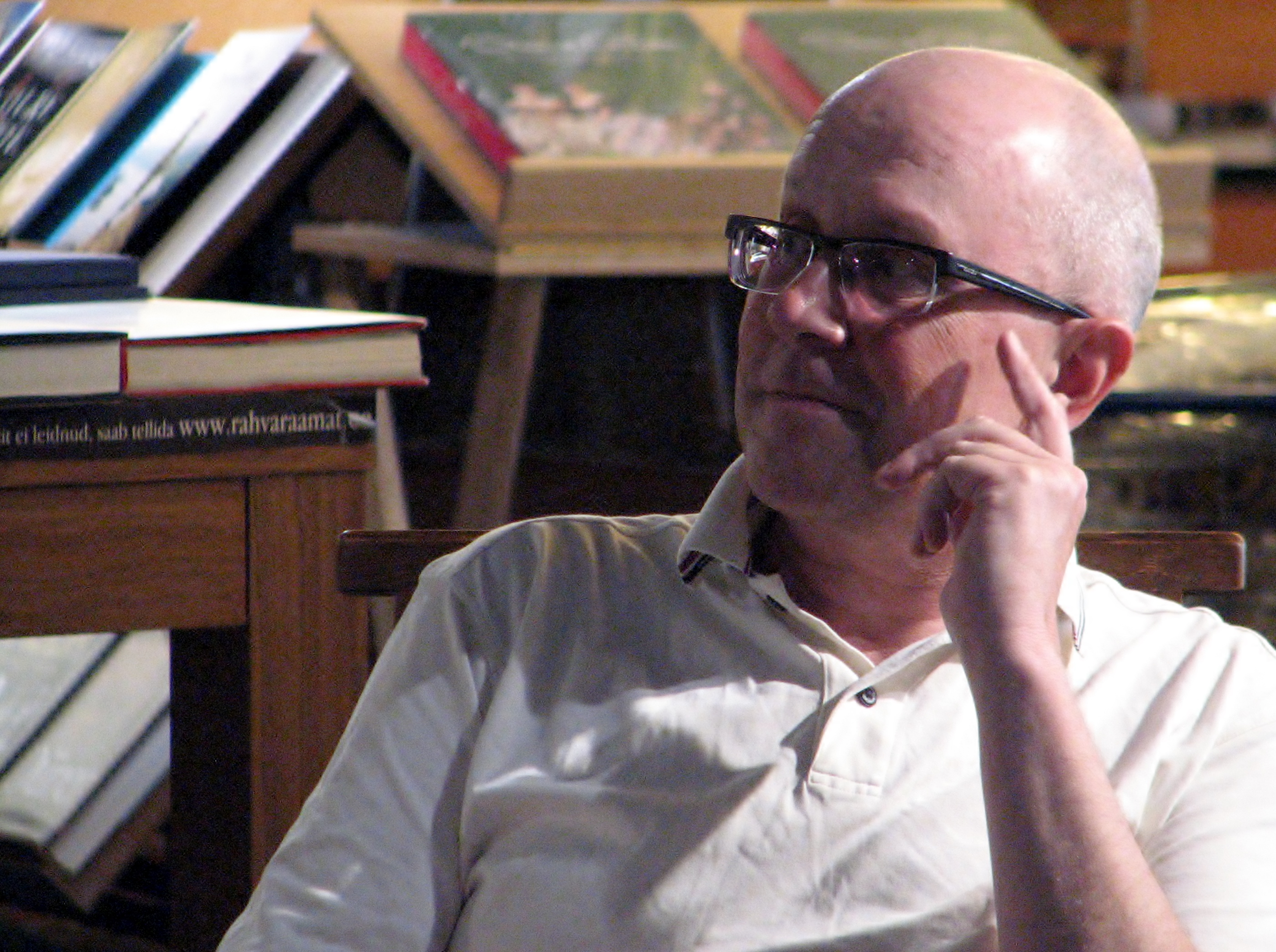 Mart Juur Peep Ehasalu raamatu "Hullu munga päevik" esitlusel Viru Keskuse Rahva Raamatus